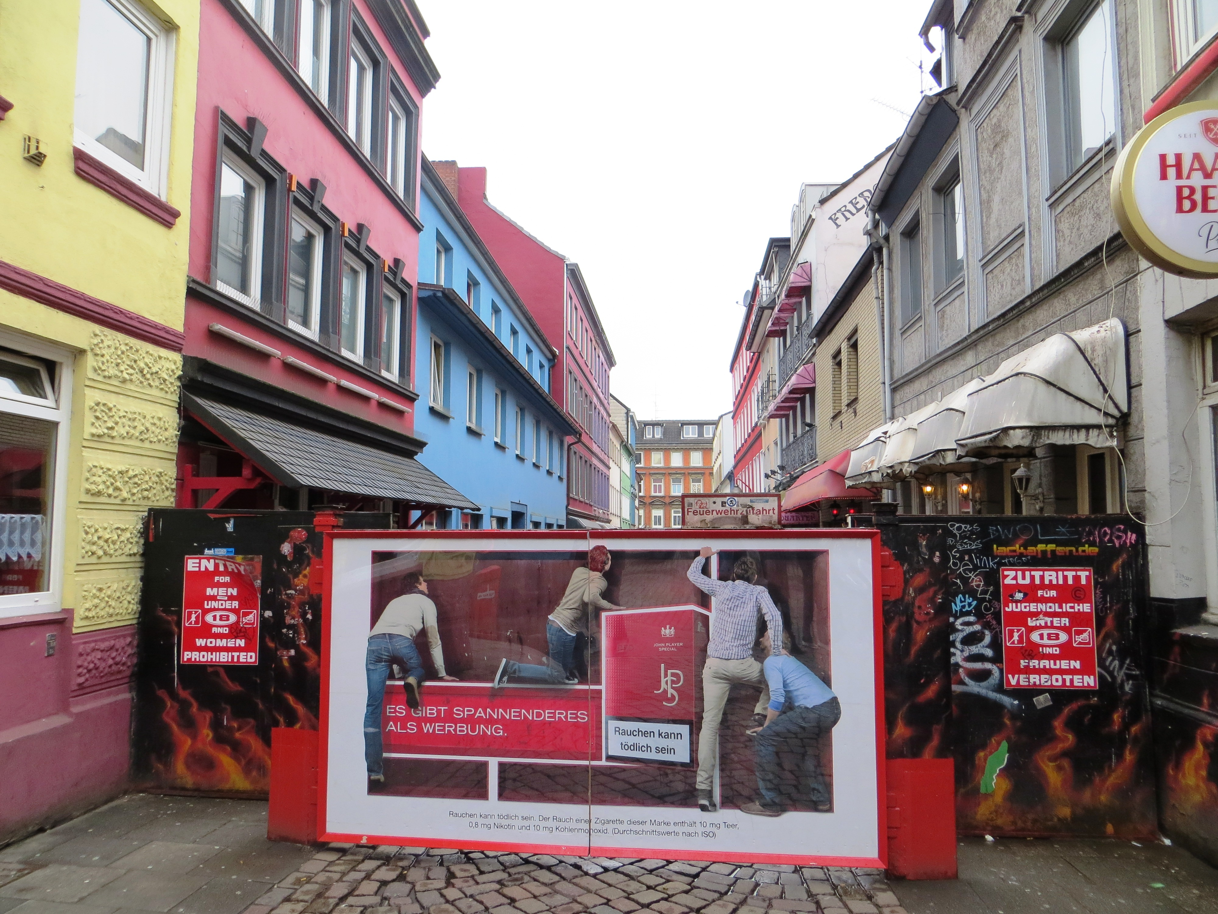 Herbertstraße, Hamburg, Duitsland